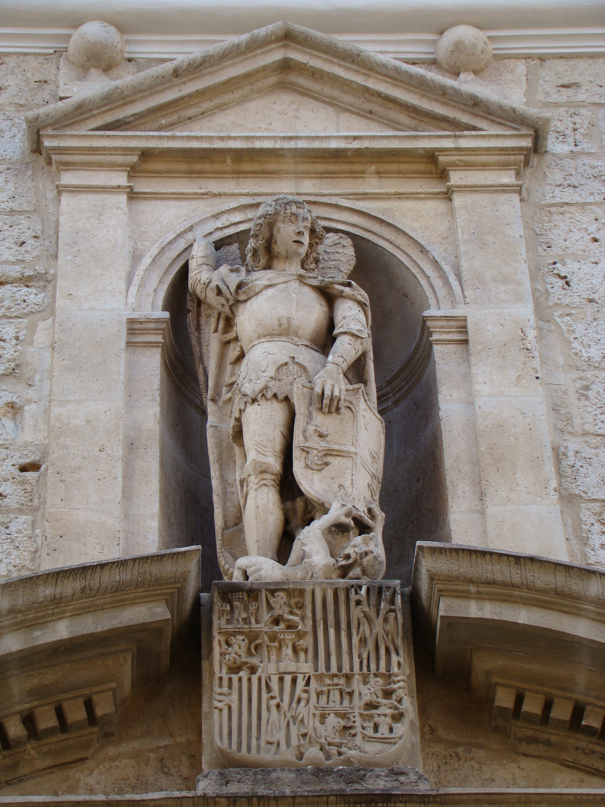 Escultura en piedra de San Miguel, procedente de la desaparecida iglesia del mismo nombre, en Valladolid. Lleva en su escudo las armas de los dominicos y en el escudo de más abajo, las armas de los Reyes Católicos. Se encuentra en una hornacina de la fachada de la parroquia de San Miguel y San Julián en Valladolid.